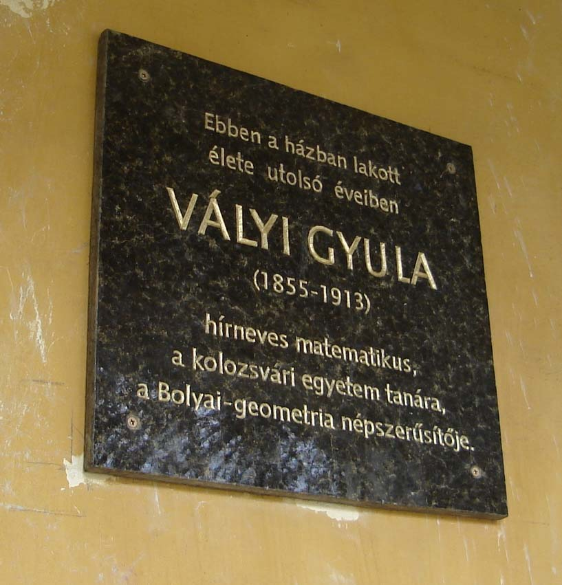 Vályi Gyula-emléktábla Kolozsvárott (Starmüller Géza munkája), Kolozsvár, Majális (Republicii) utca 20.